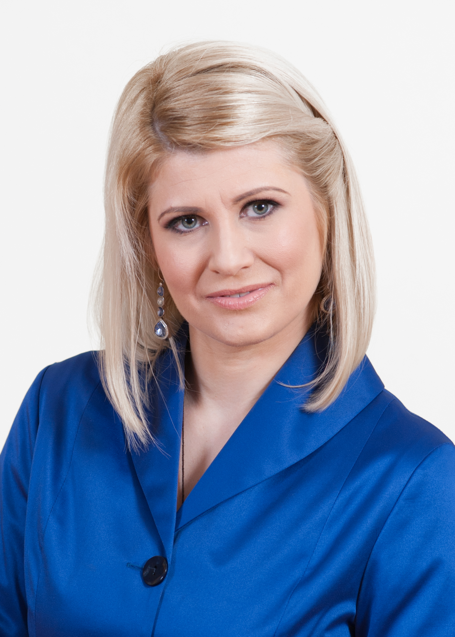 Viktoria Ladõnskaja